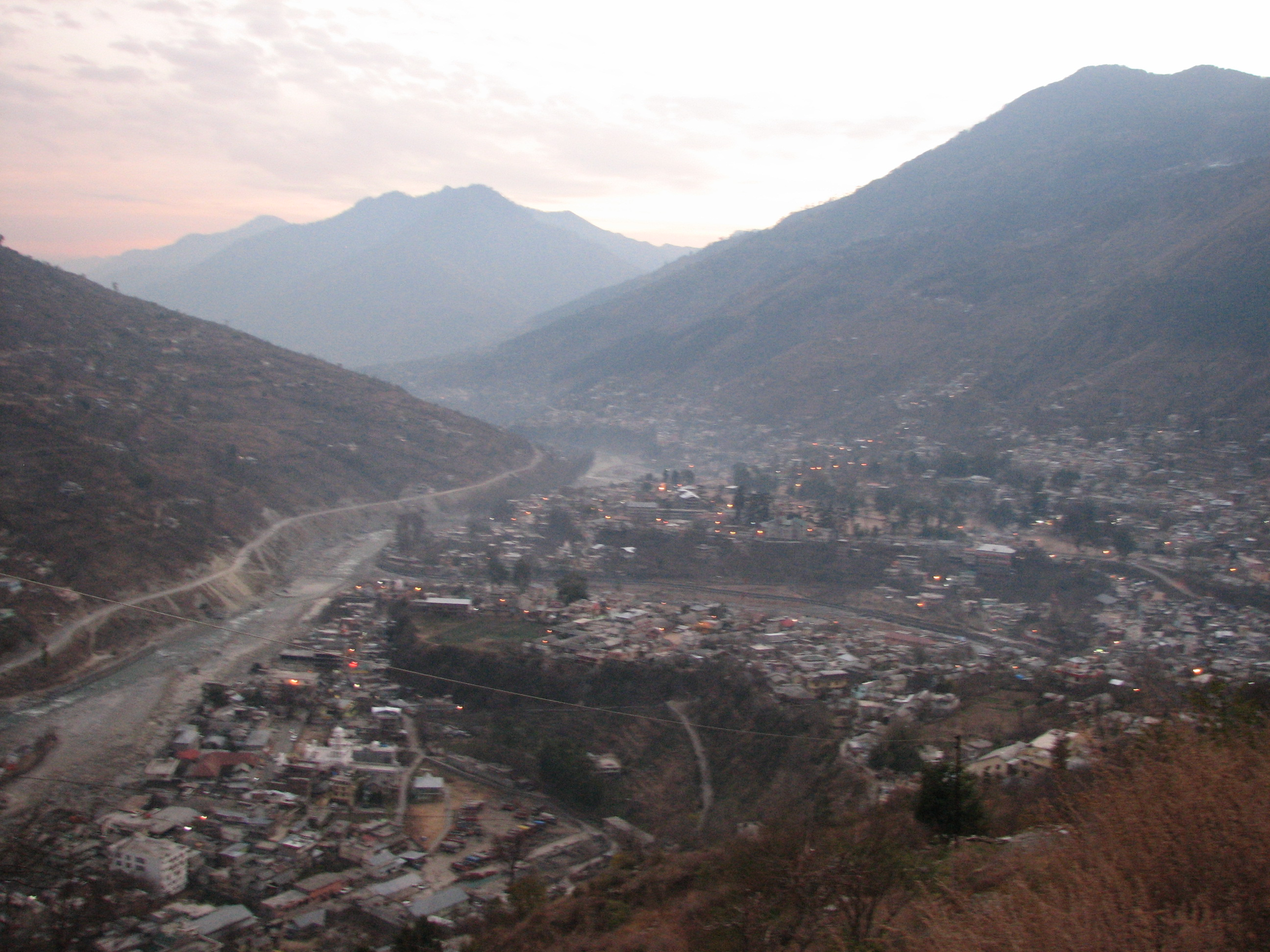 Kullu as seen from Bhekhli village